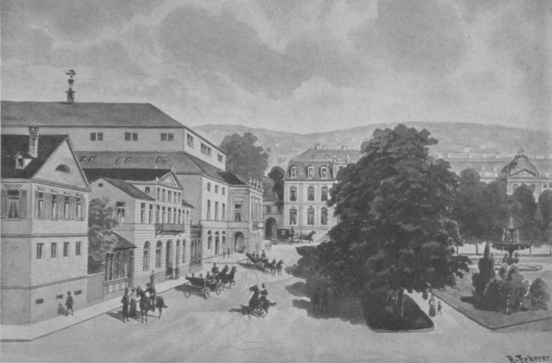 Hinweis: Zur Anzeige der Bildkommentare den Mauszeiger über das Bild bewegen. Schlossplatz in Stuttgart, 1890. Links an der Ecke der Königstraße standen die 2 Bauten des Café Marquardt an der Schlossstraße (heute Bolzstraße). Der Eckbaugiebel gehört zu dem ehemaligen Haus des Hofbankdirektors von Vellnagel. Das Vellnagelsche Haus war durch einen Garten mit der sogenannten Danneckerei verbunden, dem einstigen Wohnhaus des Bildhauers Johann Heinrich Dannecker (1758–1841). In Vellnagelschen Haus und der Danneckerei eröffnete 1844 Johann Christian Marquardt (1802–1870) das Café Marquardt. Sein Bruder war Wilhelm Marquardt (1808–1886), der Gründer des Hotel Marquardt an der gegenüberliegenden Ecke der Königstraße. Das Café Marquardt musste 1893 dem Olgabau weichen. Rechts neben dem Café Marquardt befand sich das alte Hoftheater, im Hintergrund ein Teil des Neuen Schlosses.